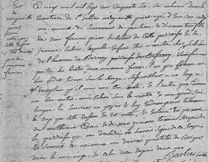 A.D. Rhône, registres paroissiaux de Saint-Julien-sur-Bibost 1756, 216 GG 3, 27/04/1756 : Ce vingt avril mil sept cent cinquante six, j’ai inhumé dans le cimetière de St-Julien[-sur-Bibost] Marguerite Pinet, âgée d’environ onze ans, munie du sacrement de pénitence & d’ex[trême] onction ; fille de Jean-François Pinet, habitant de cette paroisse & de Jeanne [Subrin ?], laquelle enfant était au maître chez Subilon de l’hameau de Bernay paroisse de Besenay, faisant paître des bêtes. Deux animaux féroces, l’un gros comme un bon bidet, tirant sur le rouge, ressemblant à un loup à l’exception qu’il avait une queue courte, et l’autre gros comme un bon mâtin, mais blanc sous le ventre & une grande queue longue ; la saisirent au gosier & lui endommagèrent tellement le cou que cette enfant en est morte ; et enterrée en présence de Mathieu Crois & de Jean Guainon, témoins requis, de la paroisse, qui ont déclaré ne savoir signer, de ce requis & sommé. Ces animaux ont dévoré quantité de bergers dans le voisinage & cela dure depuis deux ans. Barbier curé""